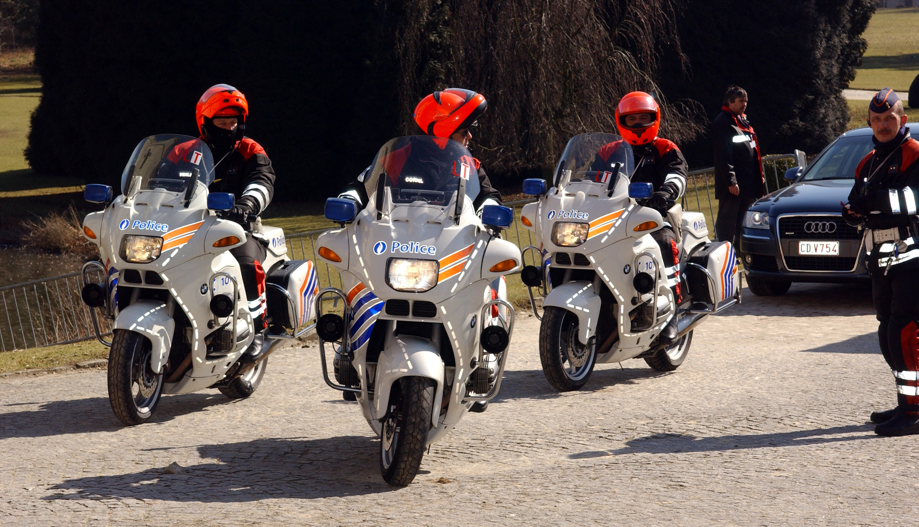 EPP Summit 23 March 2006